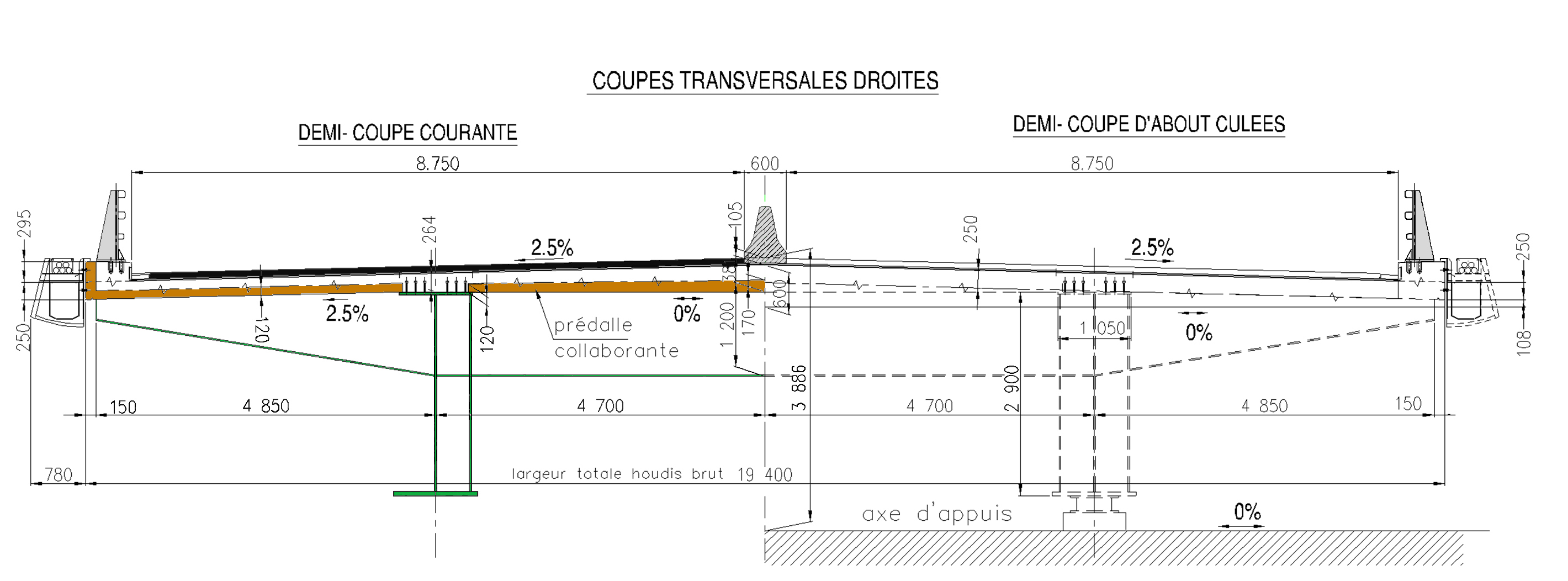 A89 - Viaduc de l'Elle - Section transversale tablier